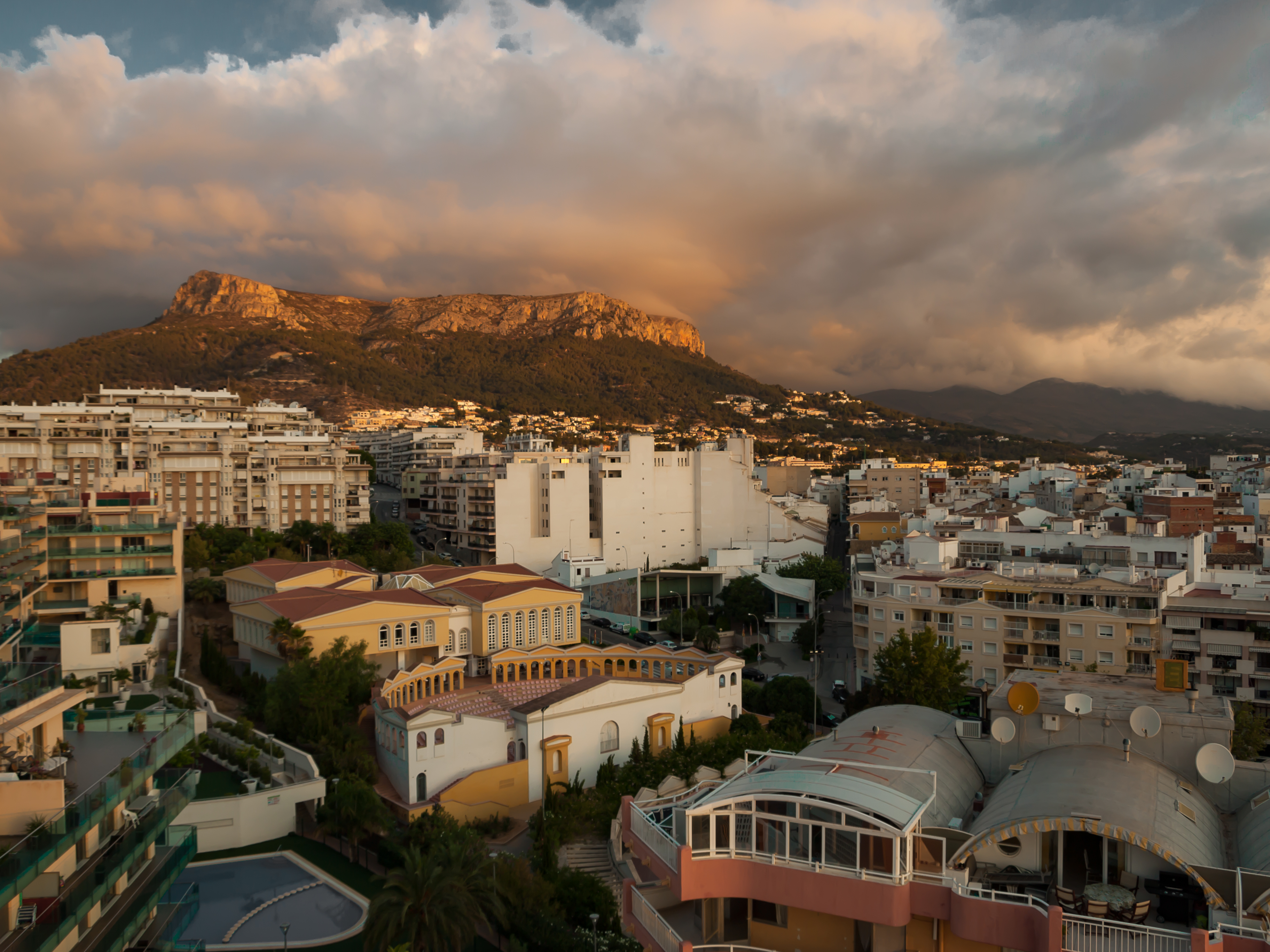 Calp y la Serra d'Olta al fondo